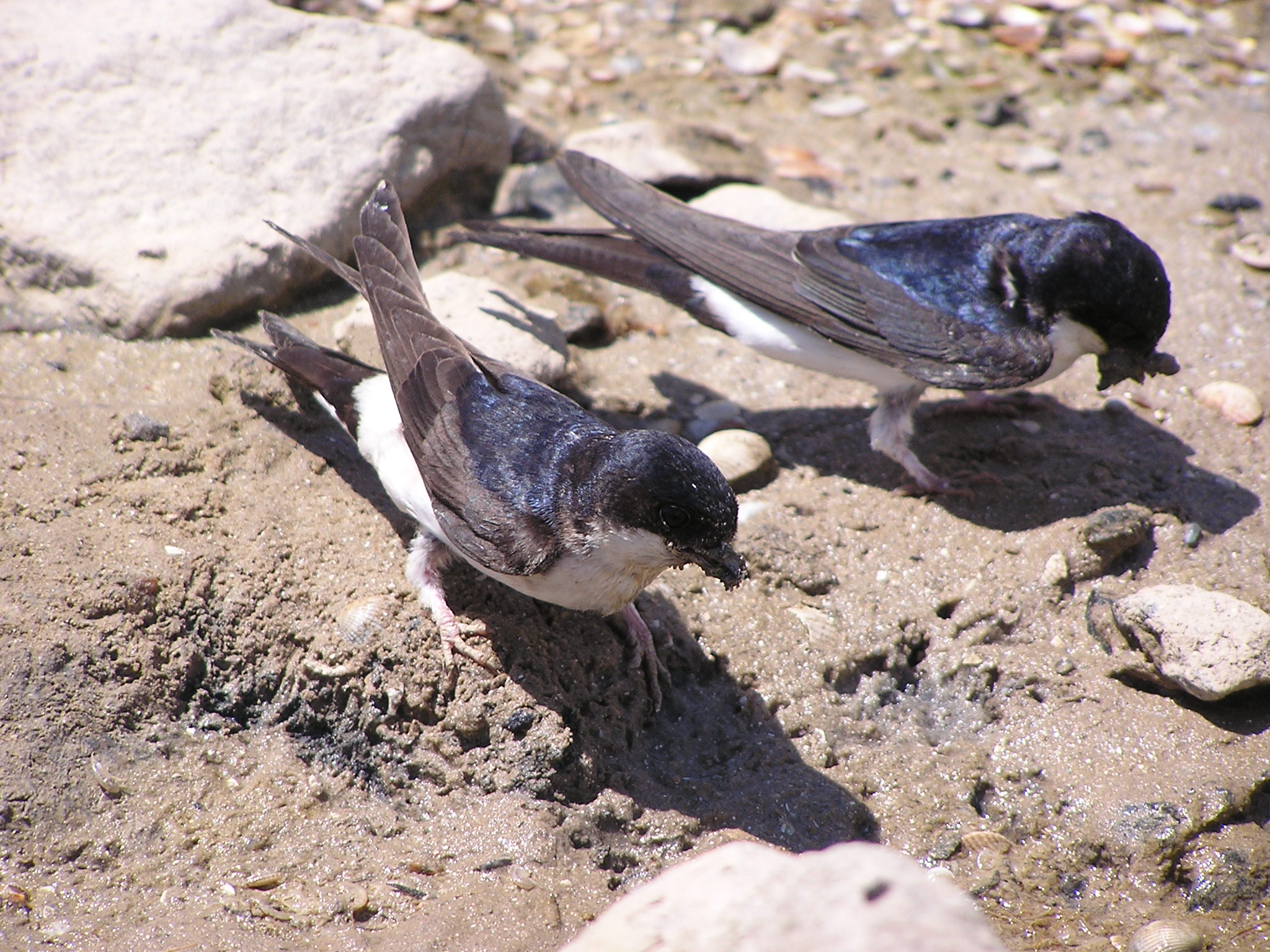 Городская ласточка, Delichon urbicum (Linnaeus, 1758), сфотографировано в Седово (Донецкая область)